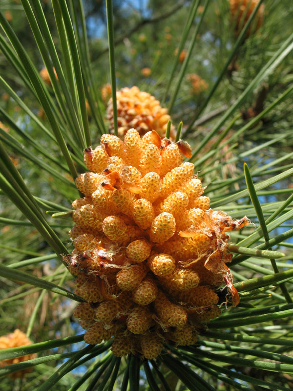 Flor masculina do piñeiro bravo, Pinus pinaster, na parroquia de Queixas